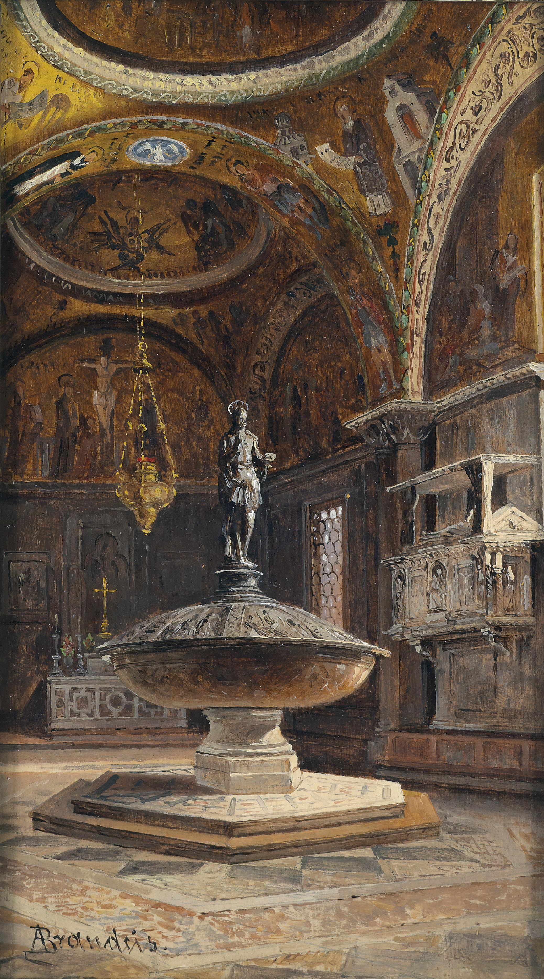 L battistero di S. Marco Venezia